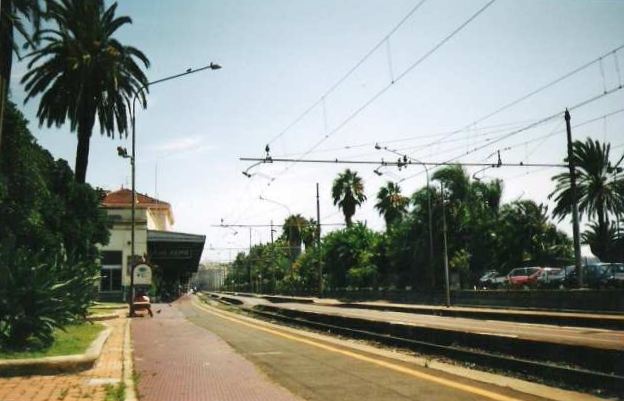 La stazione di Sanremo nello stato in cui si trovava prima della sua chiusura.